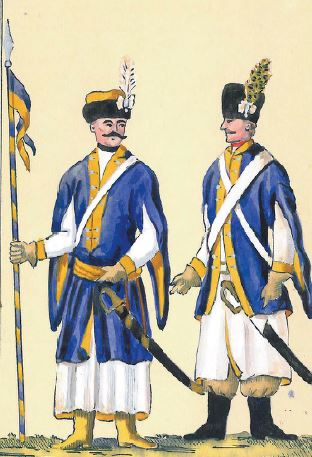 52. Ułan i pachołek litewskiej Kawalerii Narodowej ( ułan i pachołek(pocztowy) chorągwi buławy wielkiej litewskiej 2 BKN ?